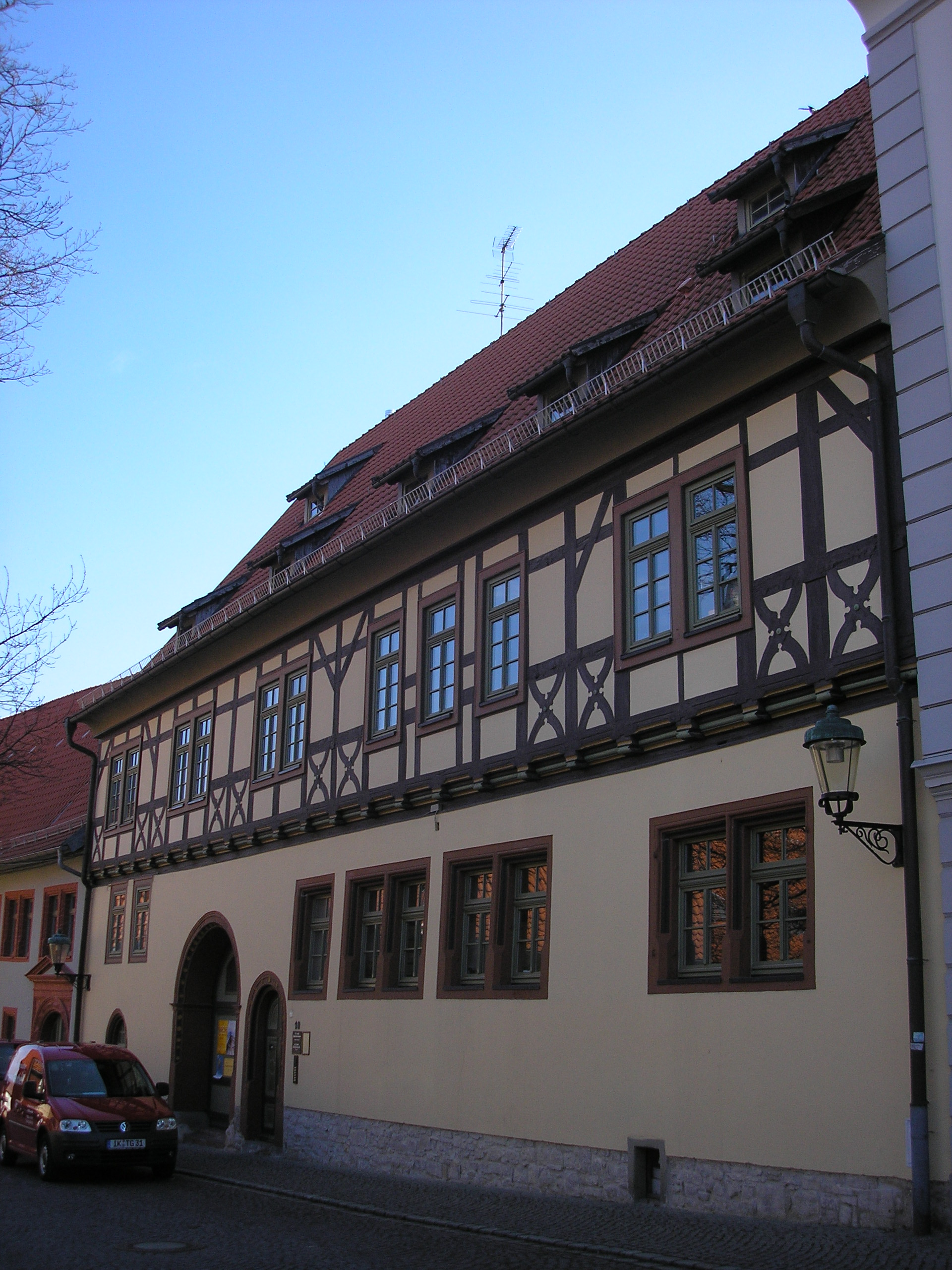 Die Superintendentur in Arnstadt (Thüringen).